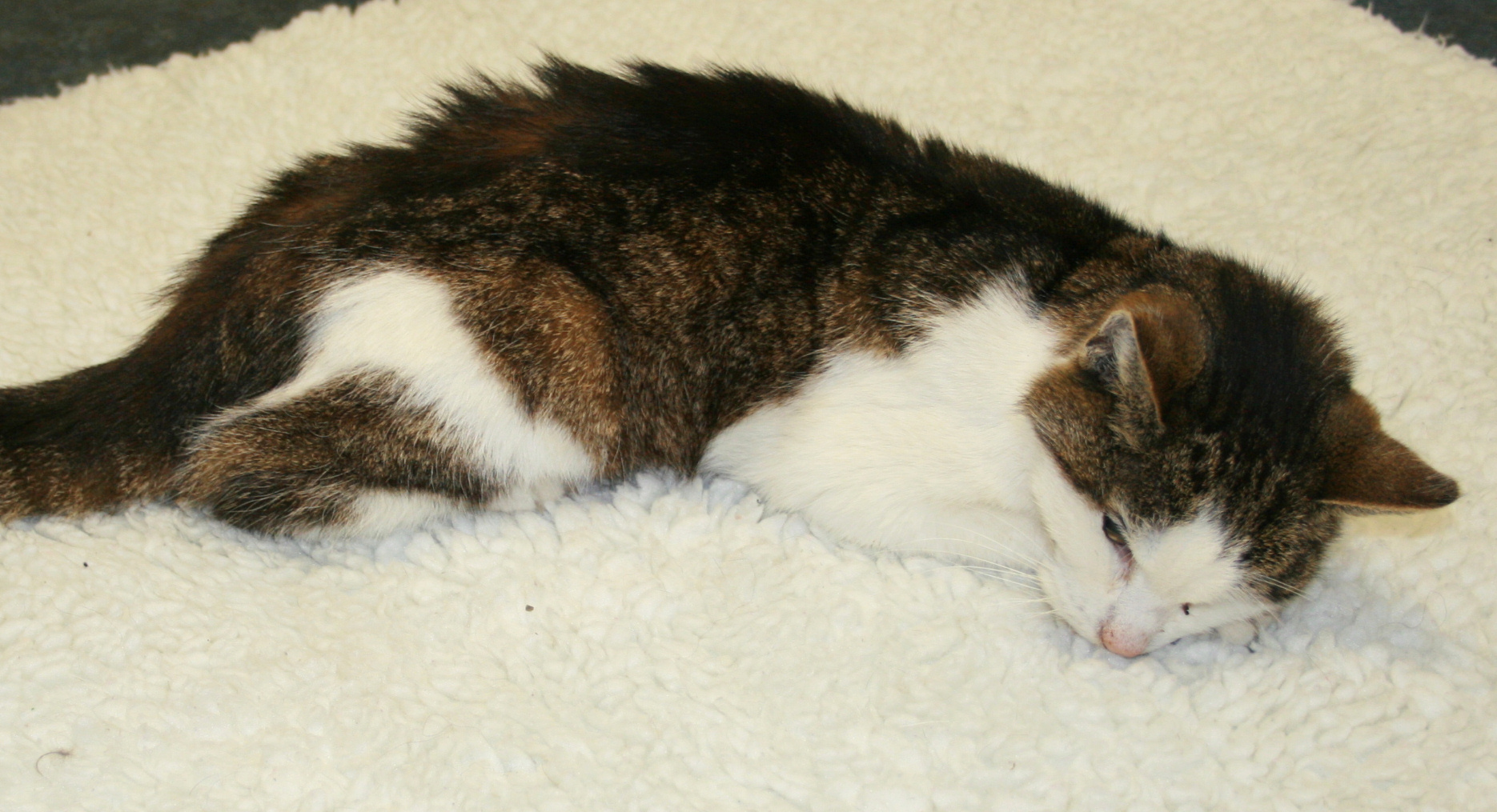 Katze mit hochgradiger CNI, Urämie, Nierenversagen, Endstadium.